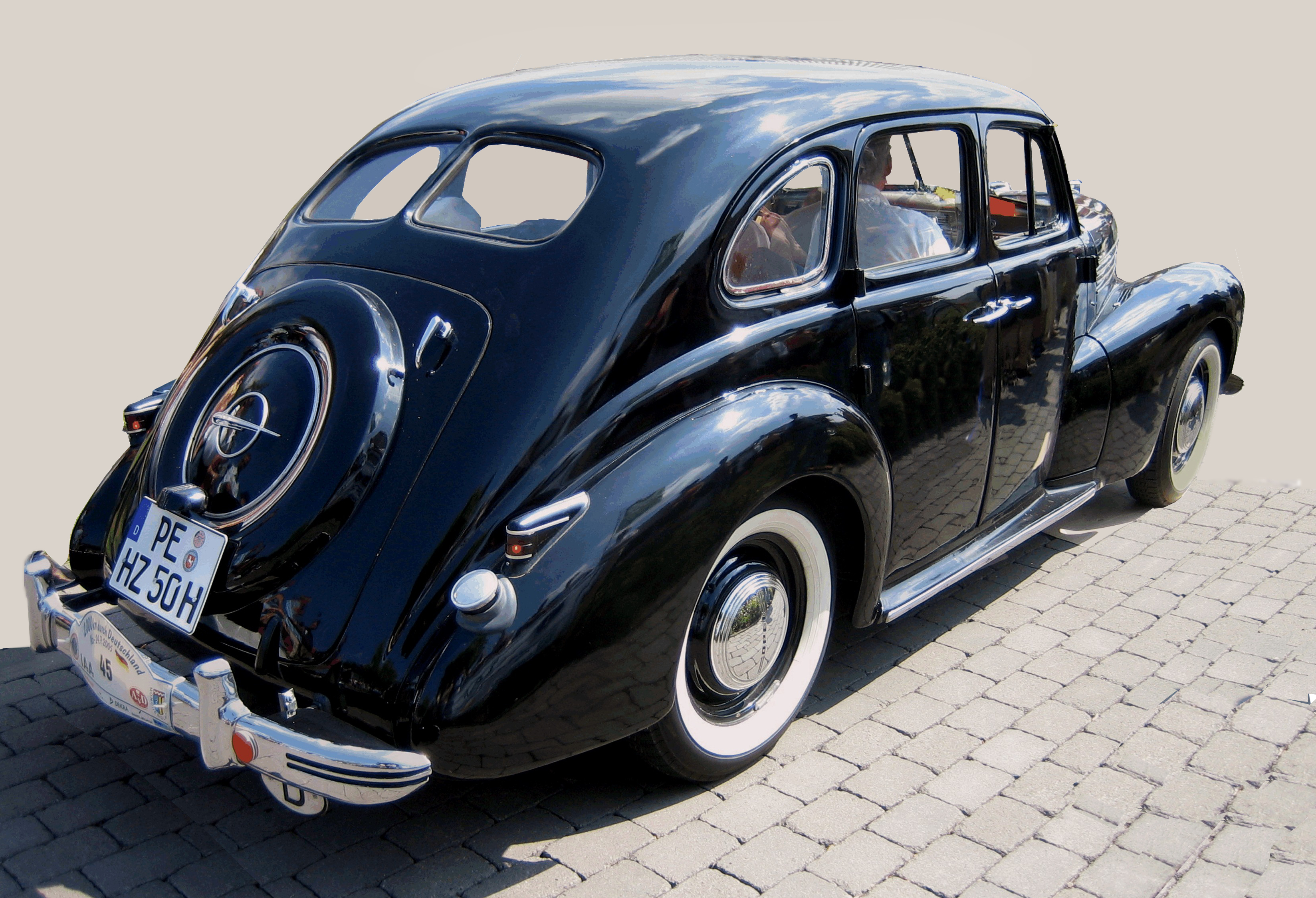 Opel Kapitän, Baujahr 1950, bei der Oldtimer-Rallye "2000 km durch Deutschland". licence plate garbled/changed